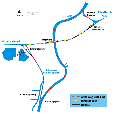 Übersicht des Wasserstraßenkreuz Magdeburg